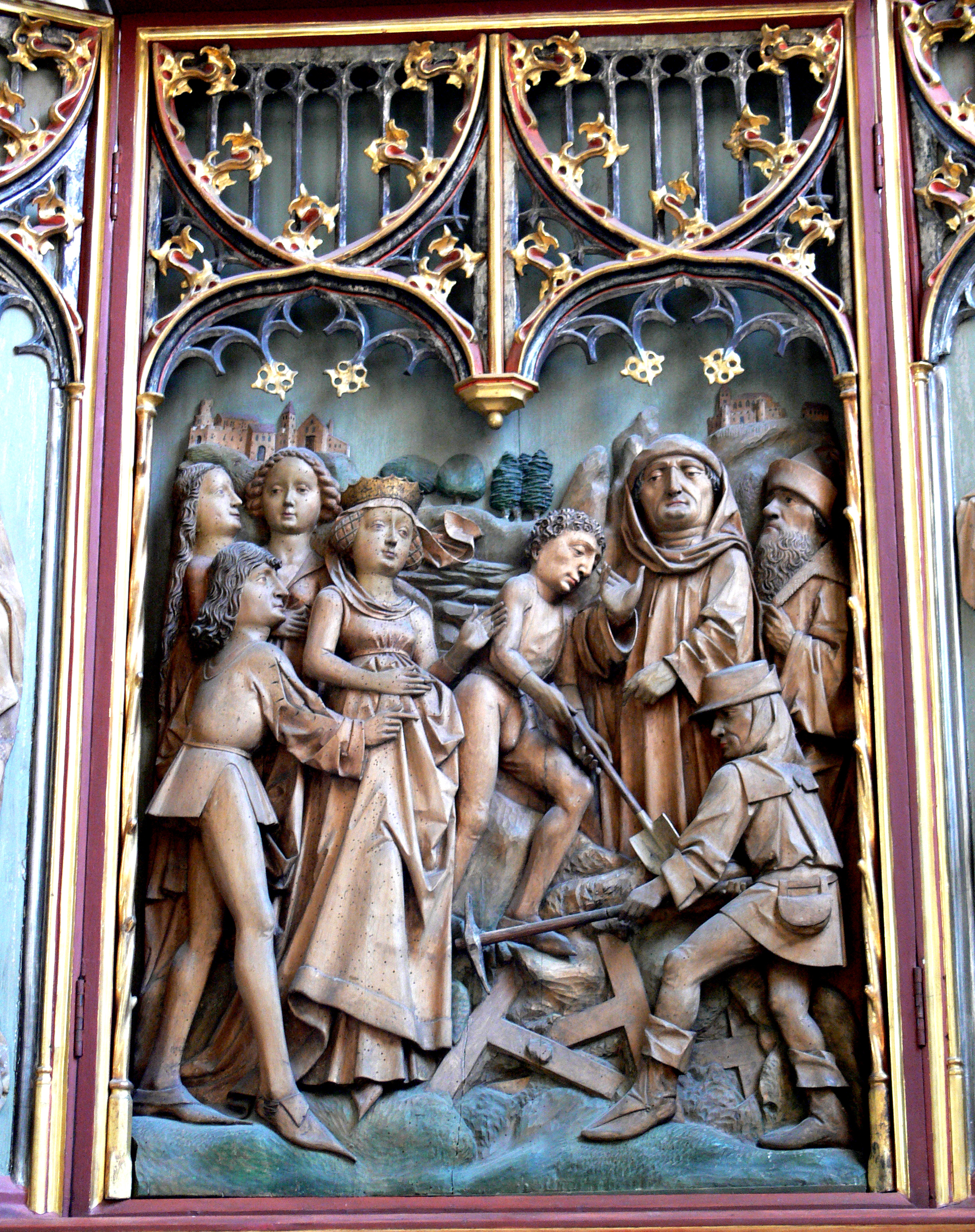 Liebfrauenmünster, Wolframs-Eschenbach, Landkreis Ansbach Kreuzauffindungsaltar: Kreuzauffindung durch Kaiserin Helena, Bamberg um 1490